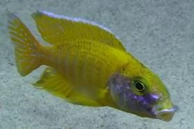 male